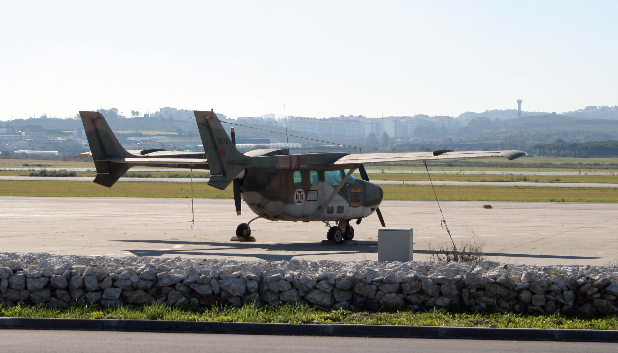 Cessna FTB337 Skymaster Portuguese Air Force Military Aircraft - Cessna FTB337 Skymaster Source/Author Soares da Silva